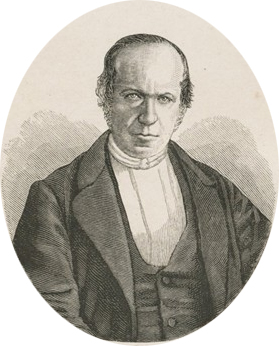 Portret van de predikant Hermanus Willem Witteveen (1815-1884)